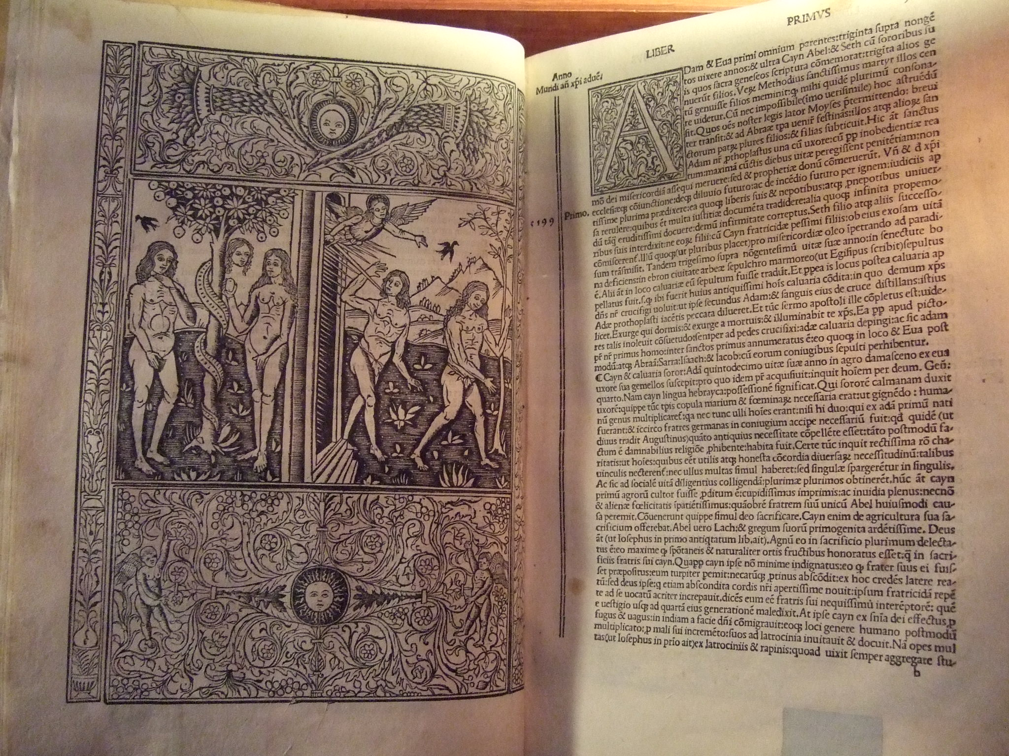 Marineo Siculo, Lucio Pandit Aragoniae veterum primordia regnum hocopus et forti... In Caesaraugusta : industria vero Georgii Coci..., 1509